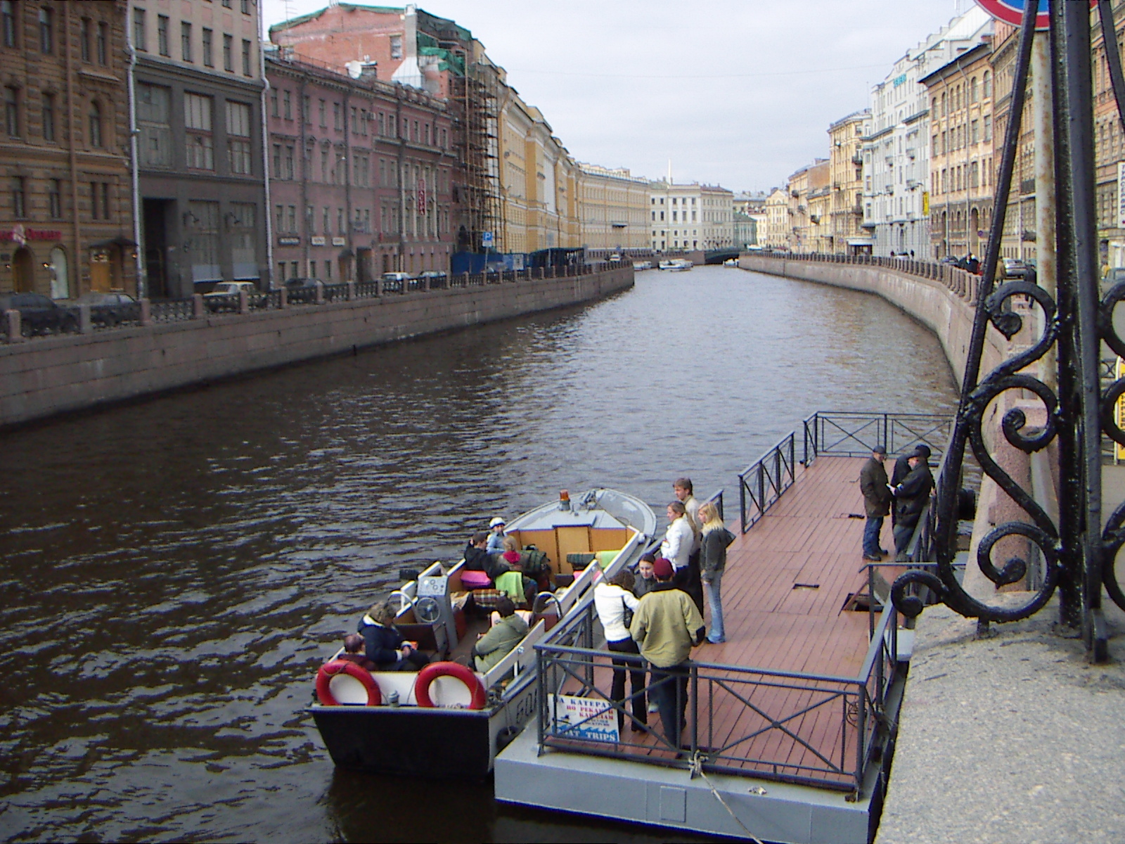 Река Мойка в районе Зелёного моста